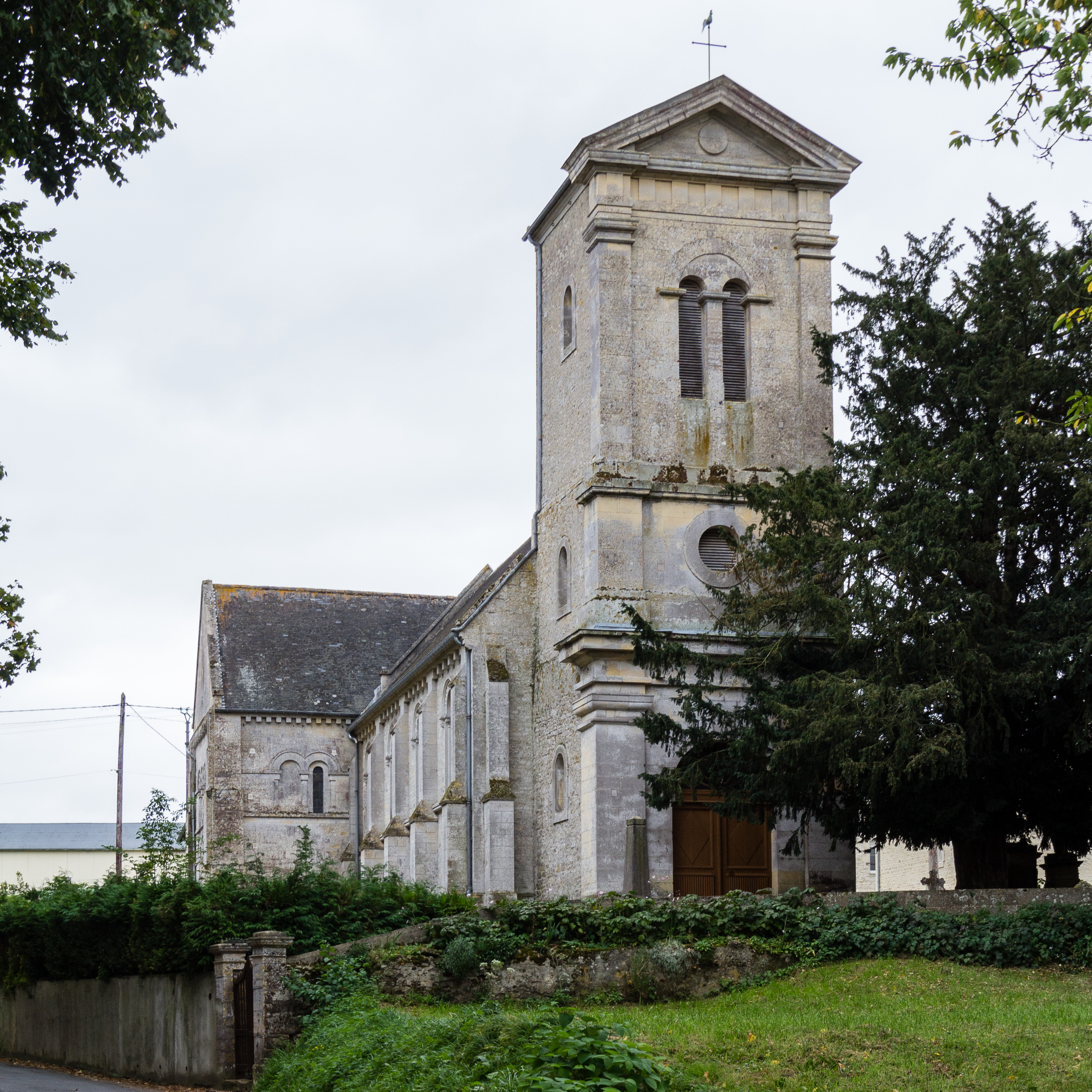 Tour-porche de l'église Saint-Pierre de Vaux-sur-Seulles.